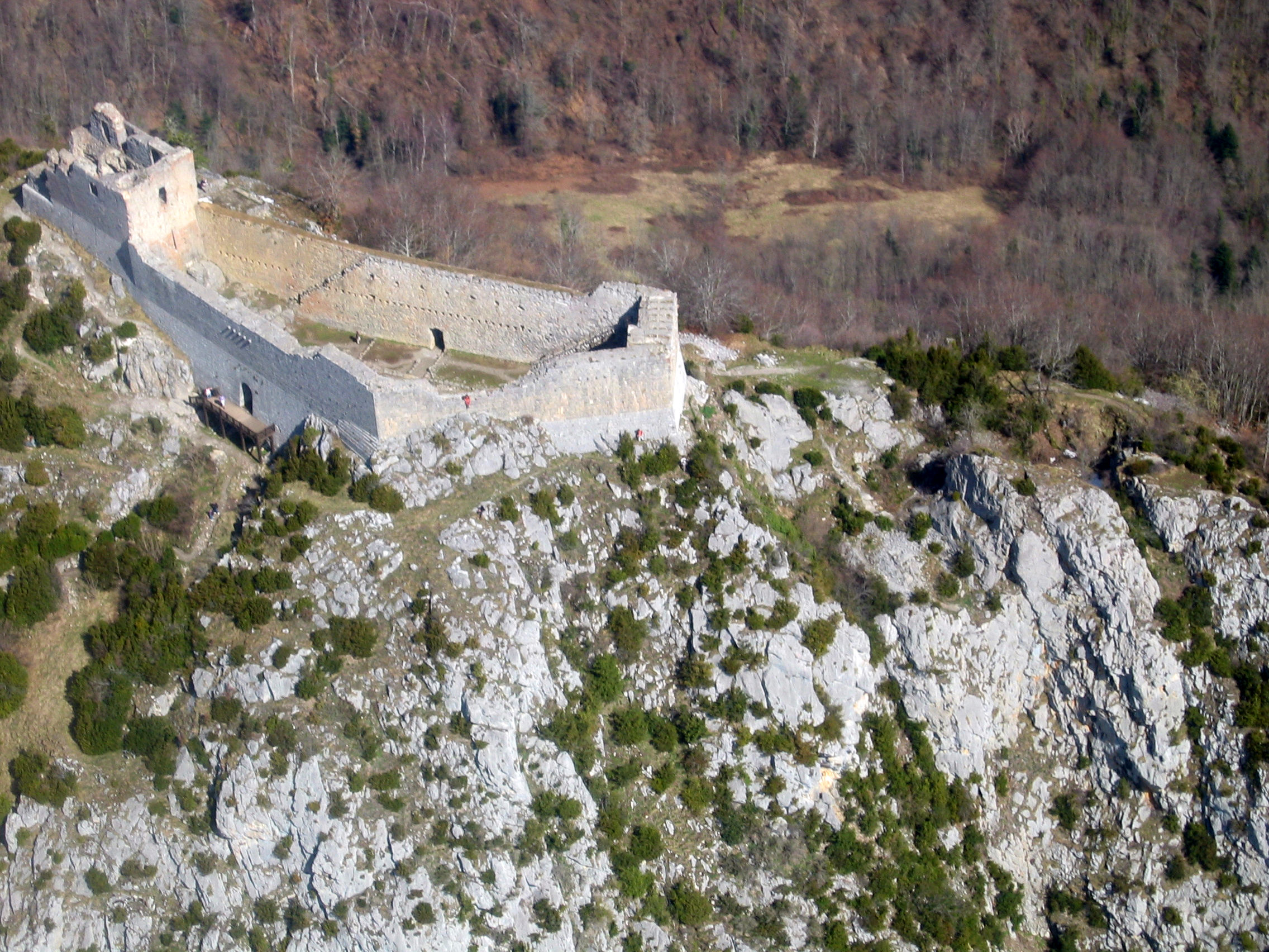 Vue aérienne du Château de Montségur depuis un avion de tourisme .